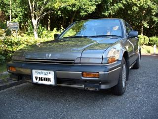 1985年式 リトラクタブル・ライト